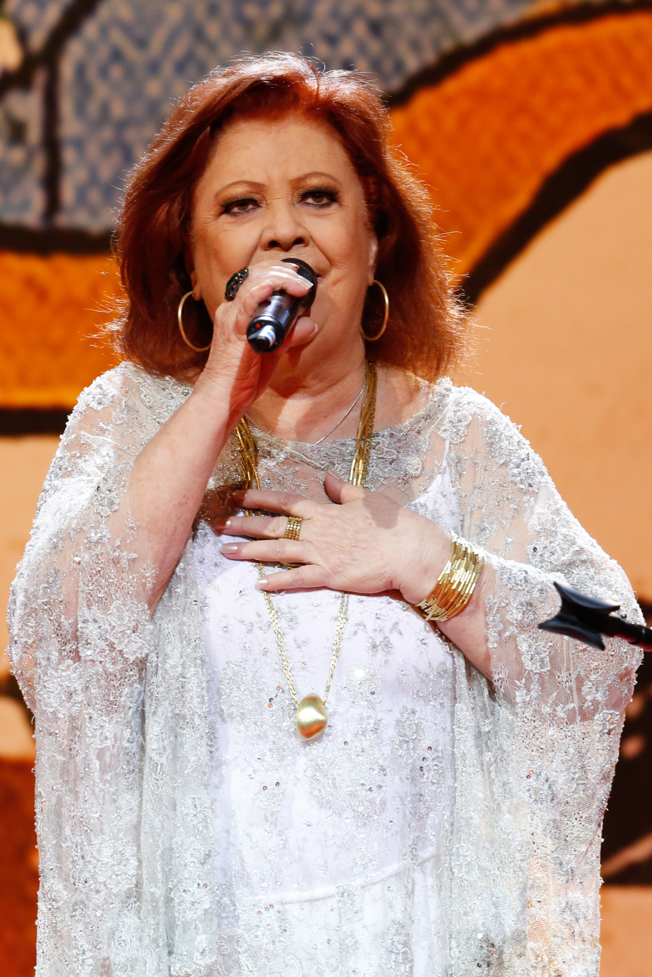 Beth Carvalho durante o 25o Premio da Musica Brasileira no Theatro Municipal. Foto: Roberto Filho (14/05/14)